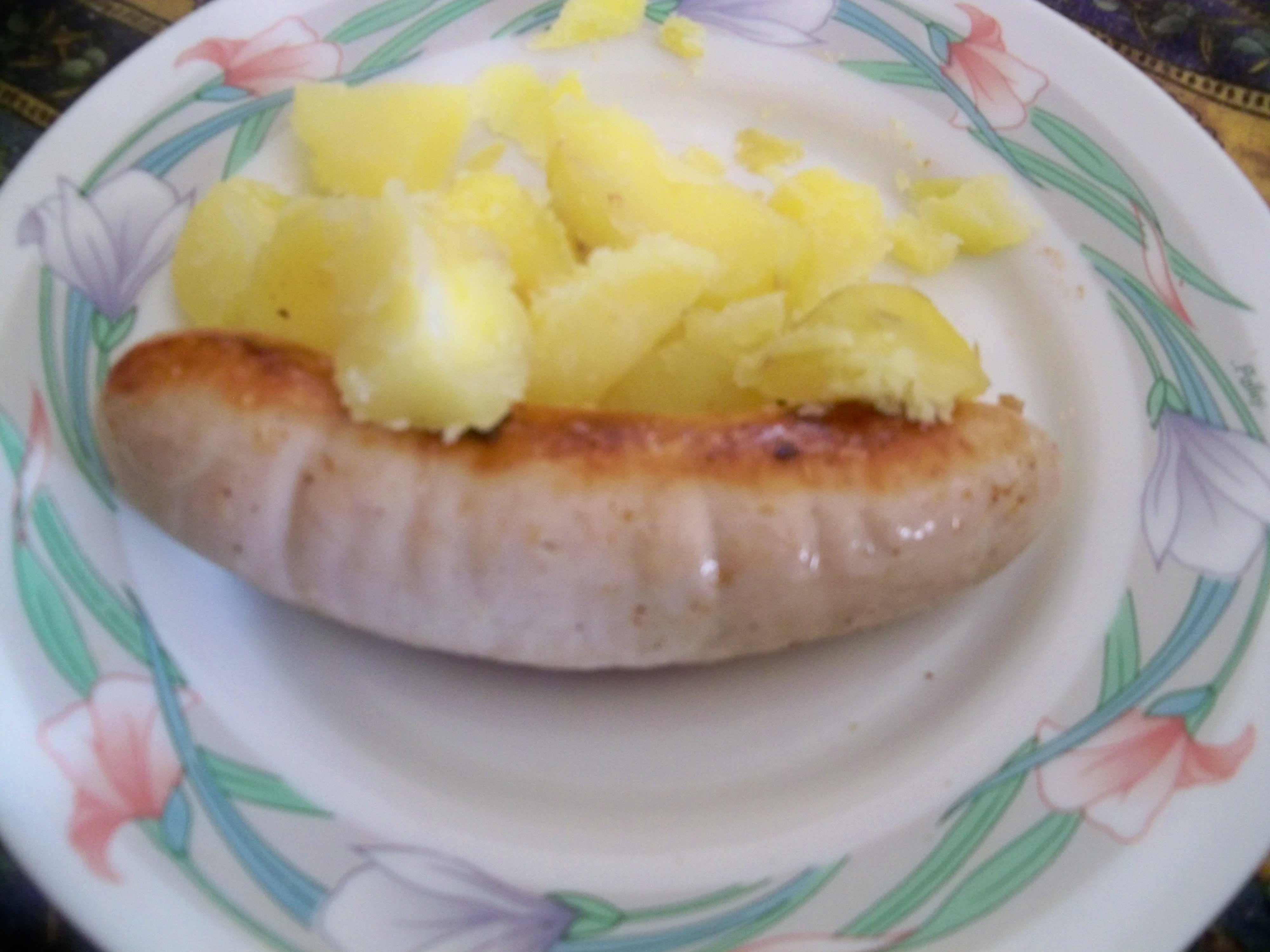 Saucisse blanche de Silésie